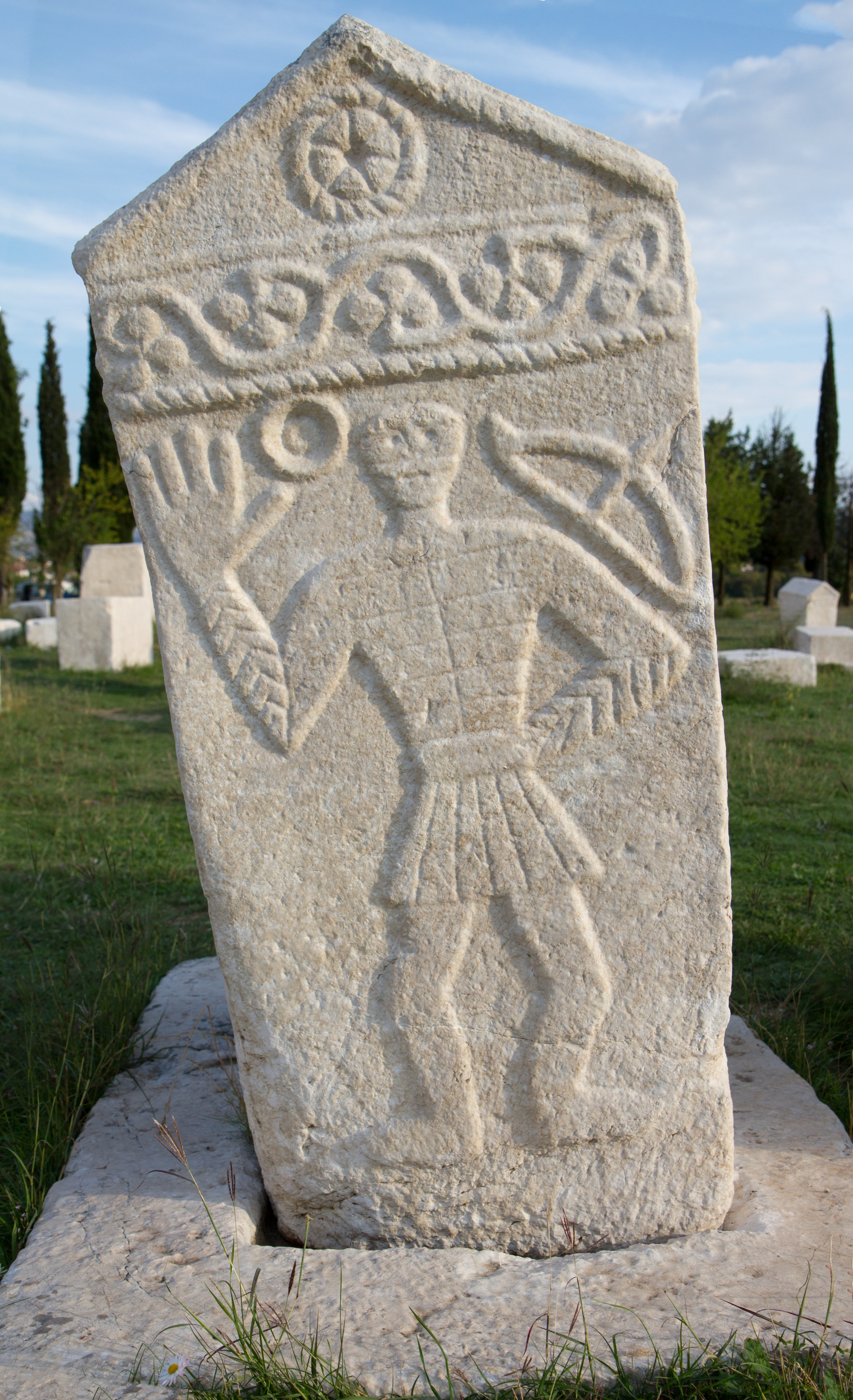 Croatia-4974.jpg